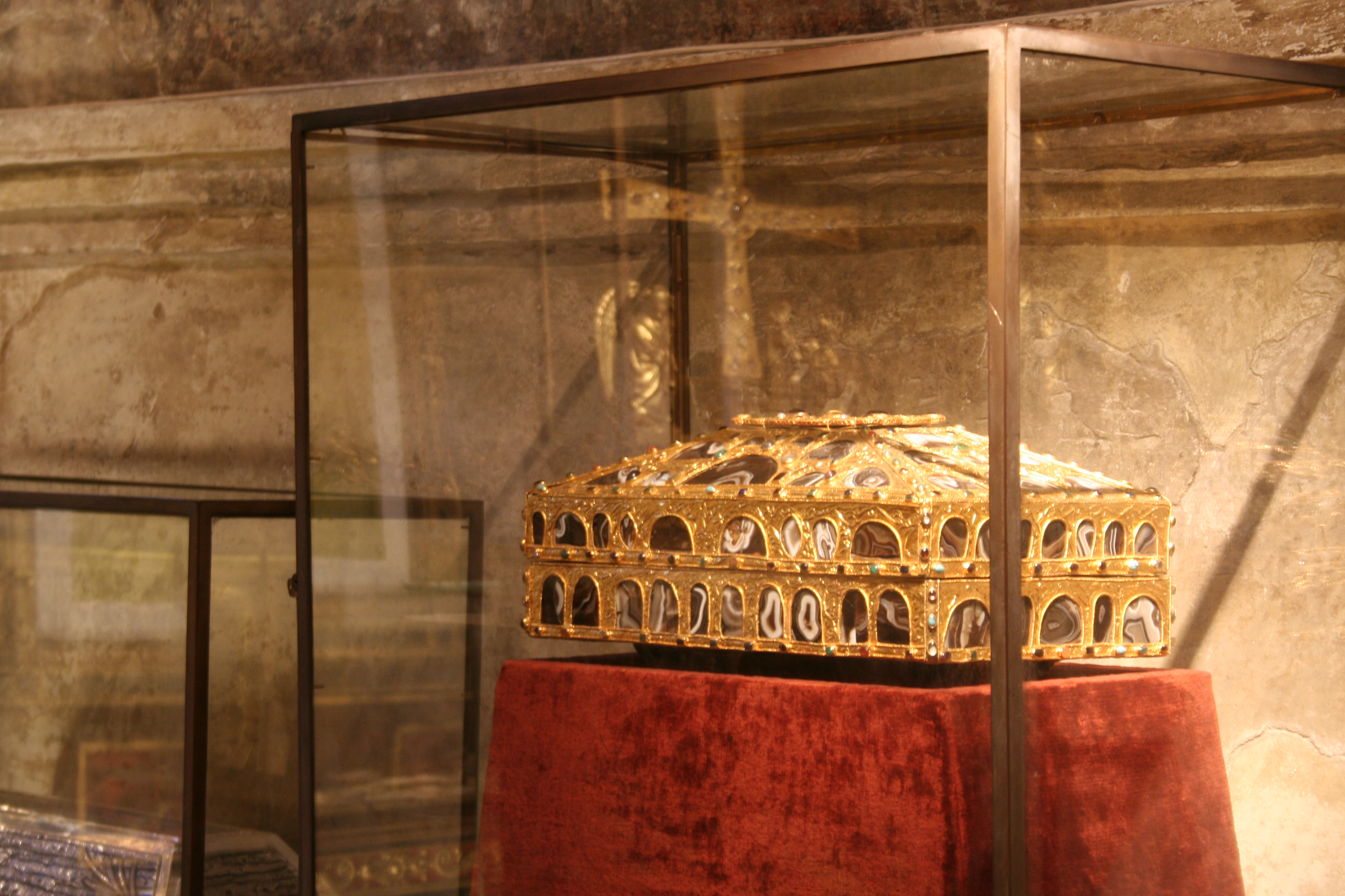 Caja de las Ágatas, conservada en el interior de la Cámara Santa de Oviedo.